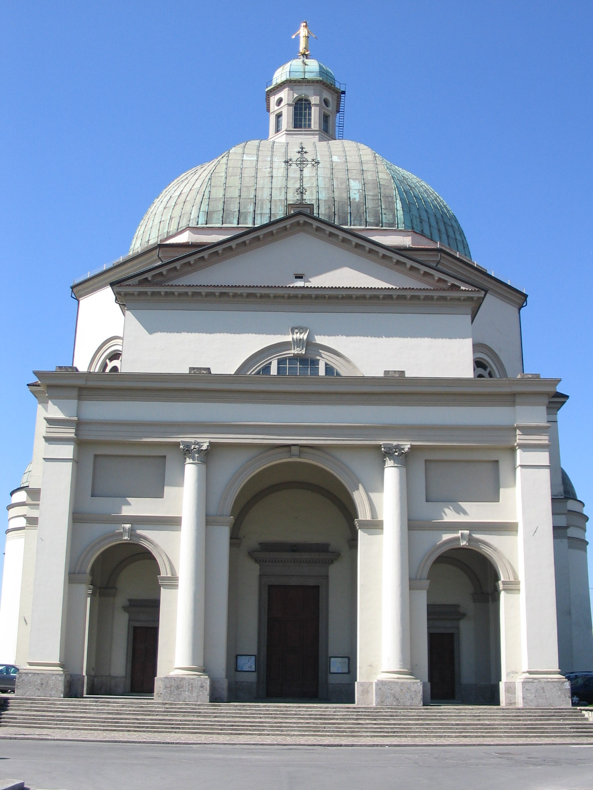 Autore Giorces. Calusco d'Adda, la parrocchiale.